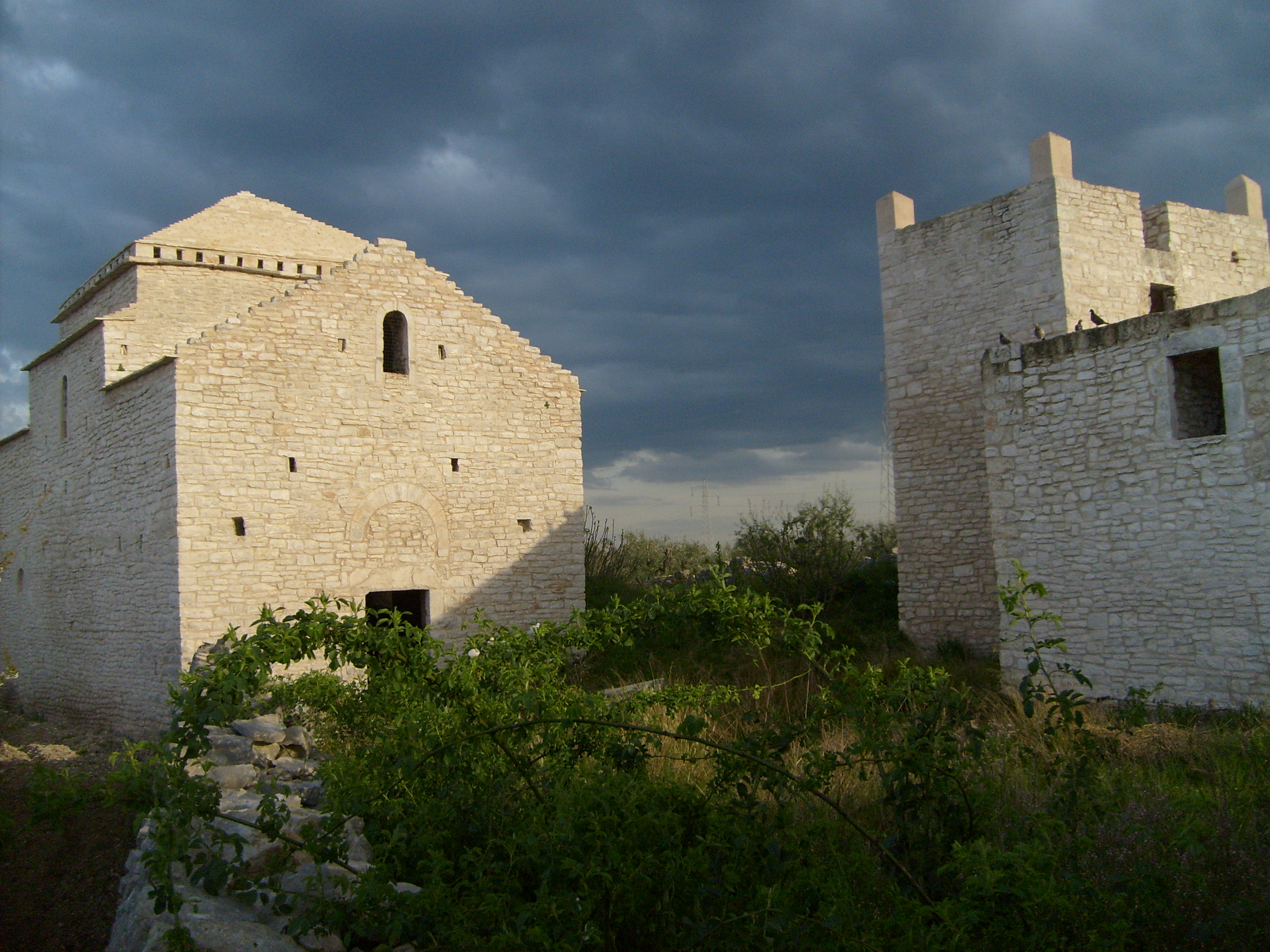 Veduta dell'interno del Casale, con la Chiesa di Ognissanti sulla sinistra